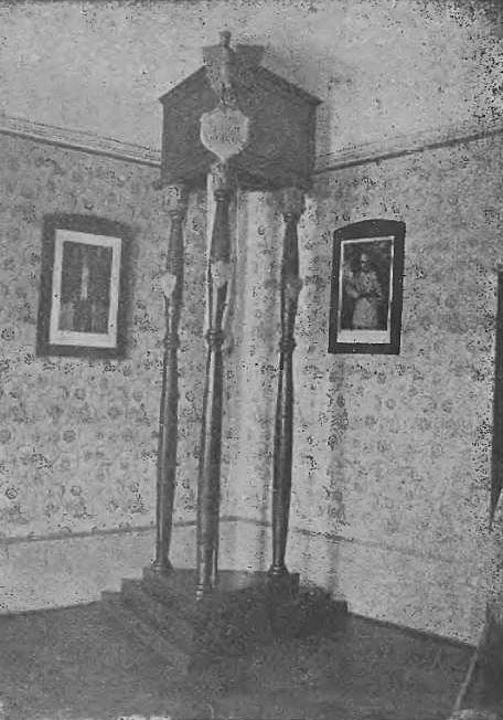 Chorągiew 10 pułku saperów w Przemyślu (-1933)